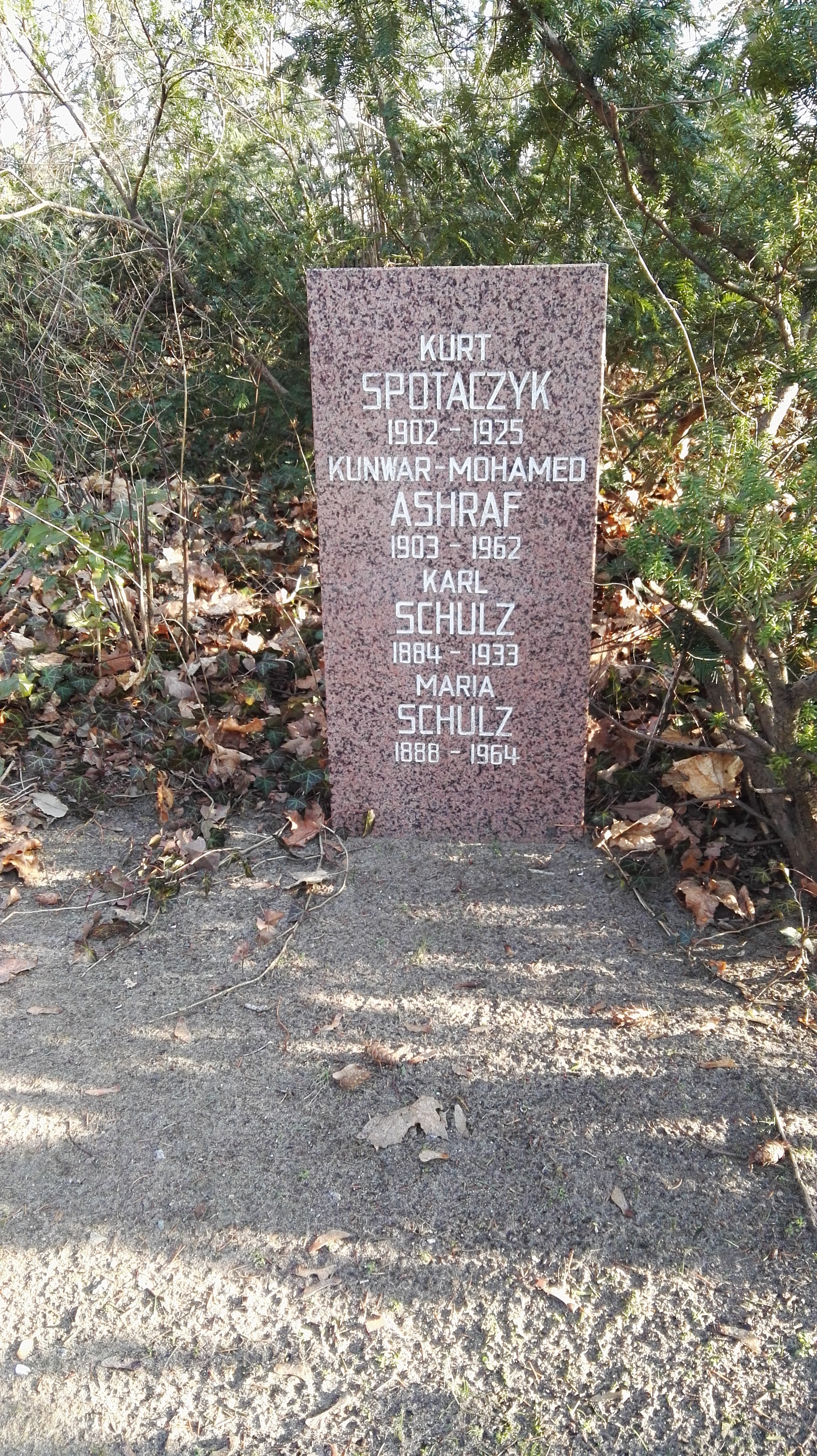 Grab von Kurt Spotaczyk , Kunwar-Mohammed Ashraf, Karl Schulz in der Grabanlage Pergolenweg auf dem Sozialistenfriedhof des Zentralfriedhofs Friedrichsfelde